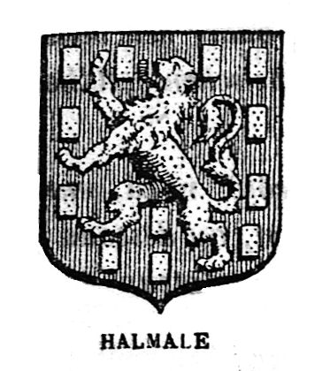 PRAENOBLIS Familia ex Belg.